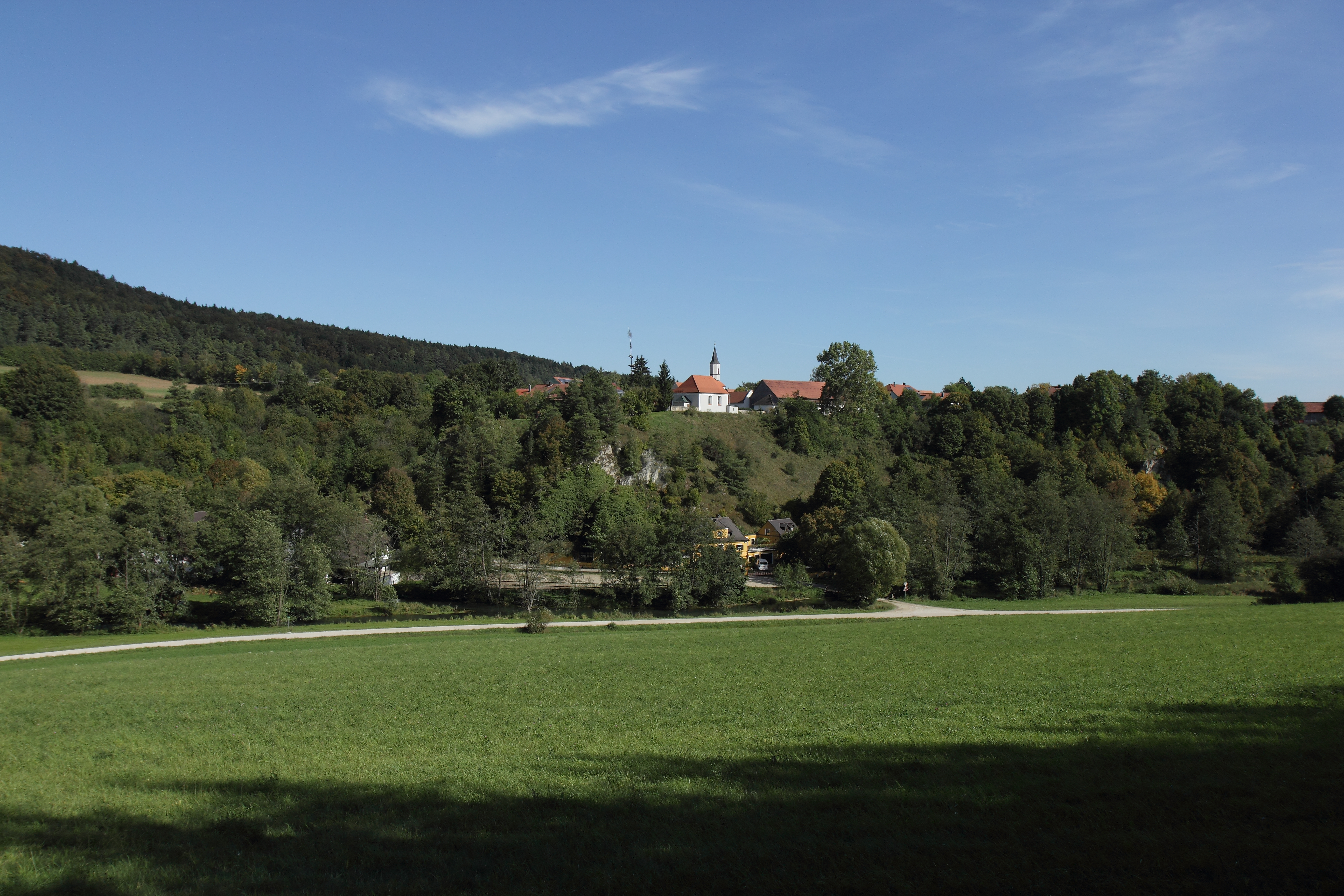 Burgstall Hackenhofen - Ansicht des Bergspornes mit der Burgstelle aus südwestlicher Richtung